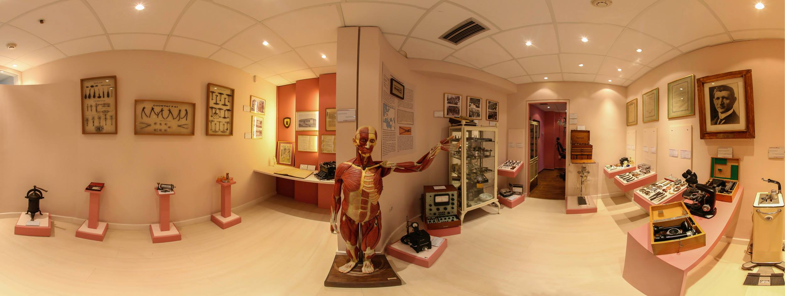 Πανοραμική άποψη κύριου εκθεσιακού χώρου Μουσείου